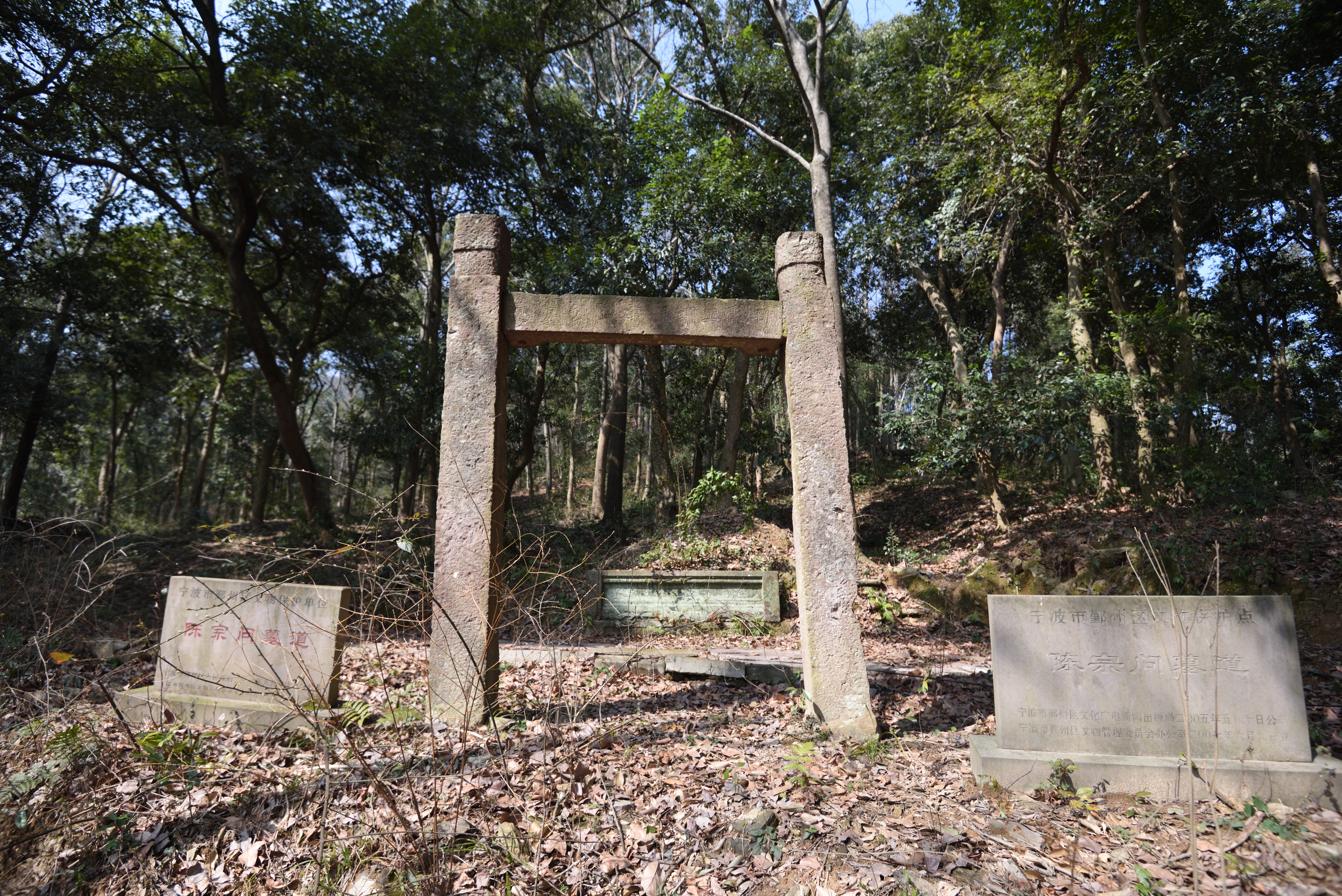 陈宗问墓道，位于宁波市四明山村庙夹岙